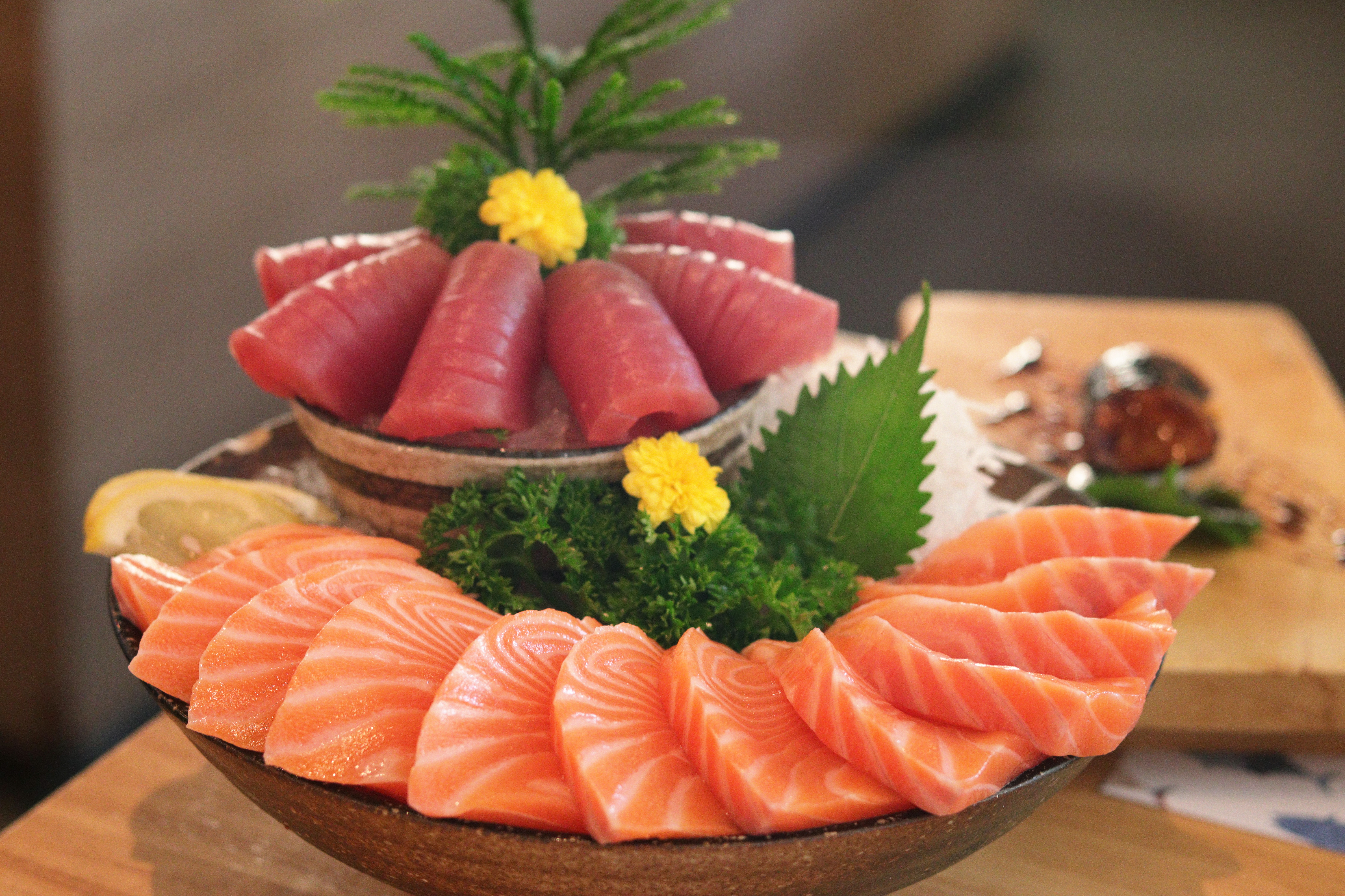 Sashimi - Maguro Restaurant, Bangna, Bangkok